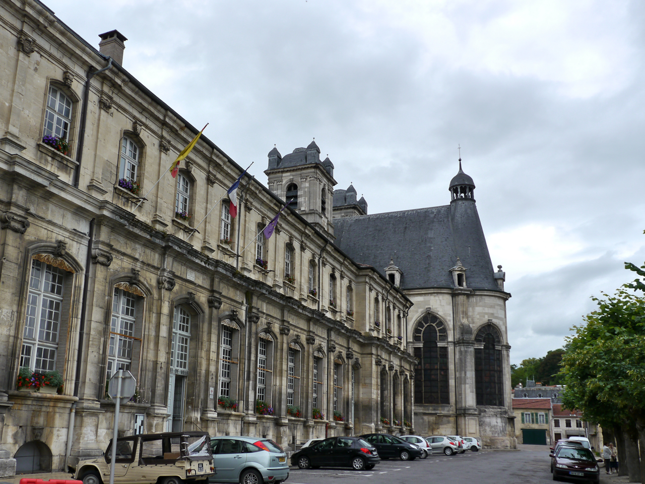 Ancienne Abbaye Saint-Michel de Saint-Mihiel, vue du chœur Renaissance de l'abbatiale et de l'aile Est occupée aujourd'hui par l'hôtel de ville .